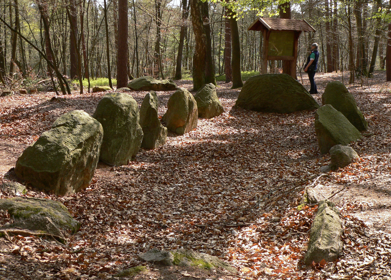 Teufelsbett mit Infotafel nahe Giebichenstein